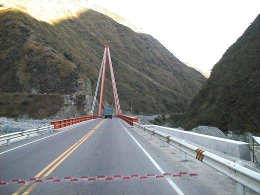 Puente Yanango